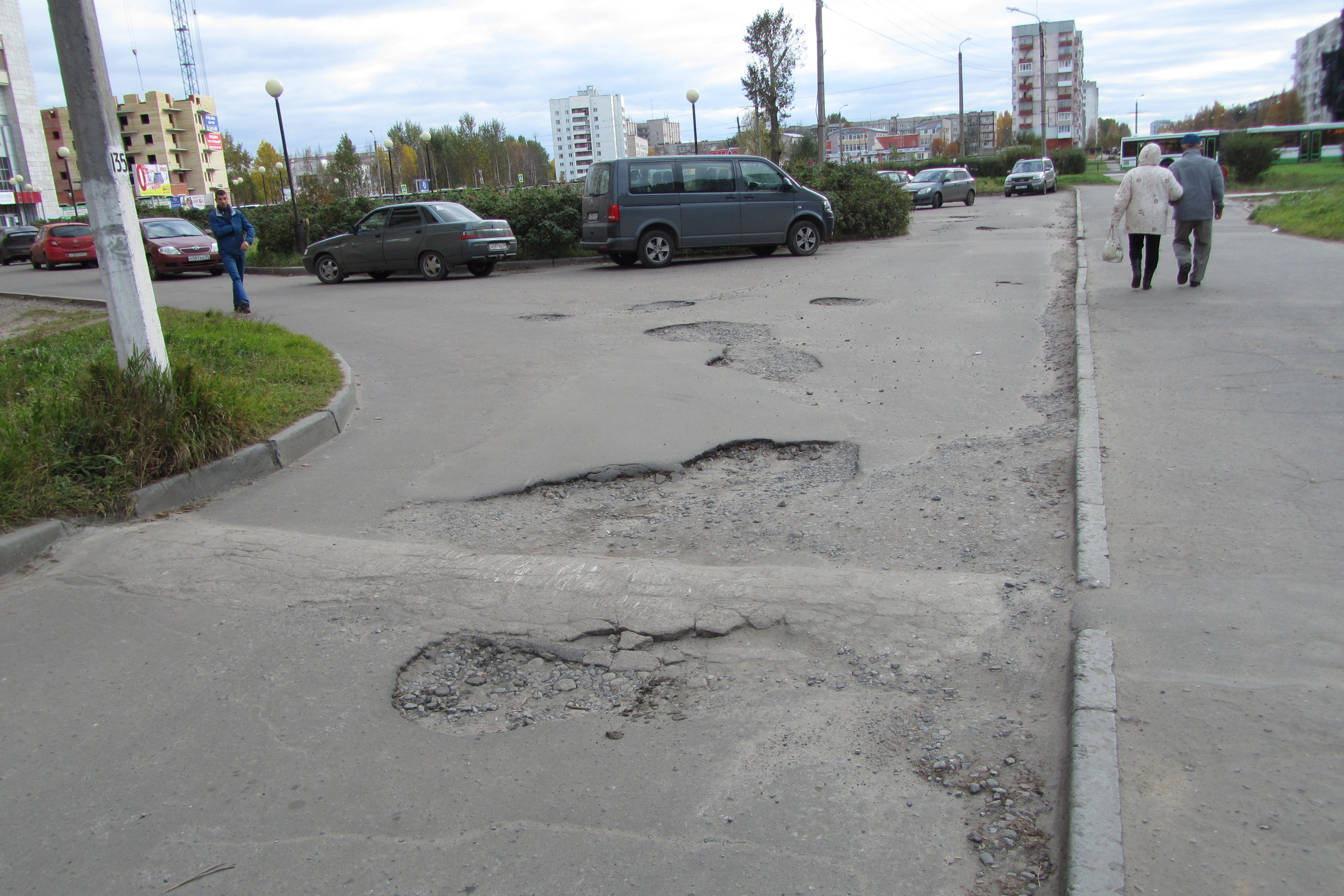 Северодвинск. Улица Ломоносова. Нанотехнологии от ЕР в действии.Чтоб по ямам не гоняли, мерия соорудила лежачий полицейский.